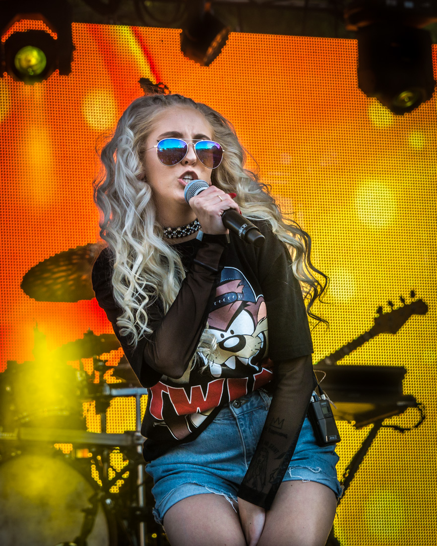 Peg Parnevik under RIX FM festivalen i Kungsträdgården i Stockholm den 24 augusti 2016.